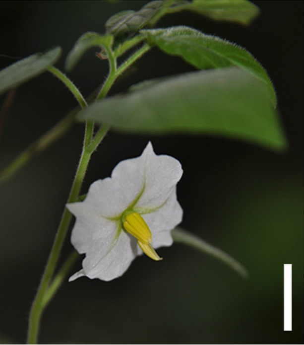 Solanum evolvuloides. Scale bar = 1.5 cm.